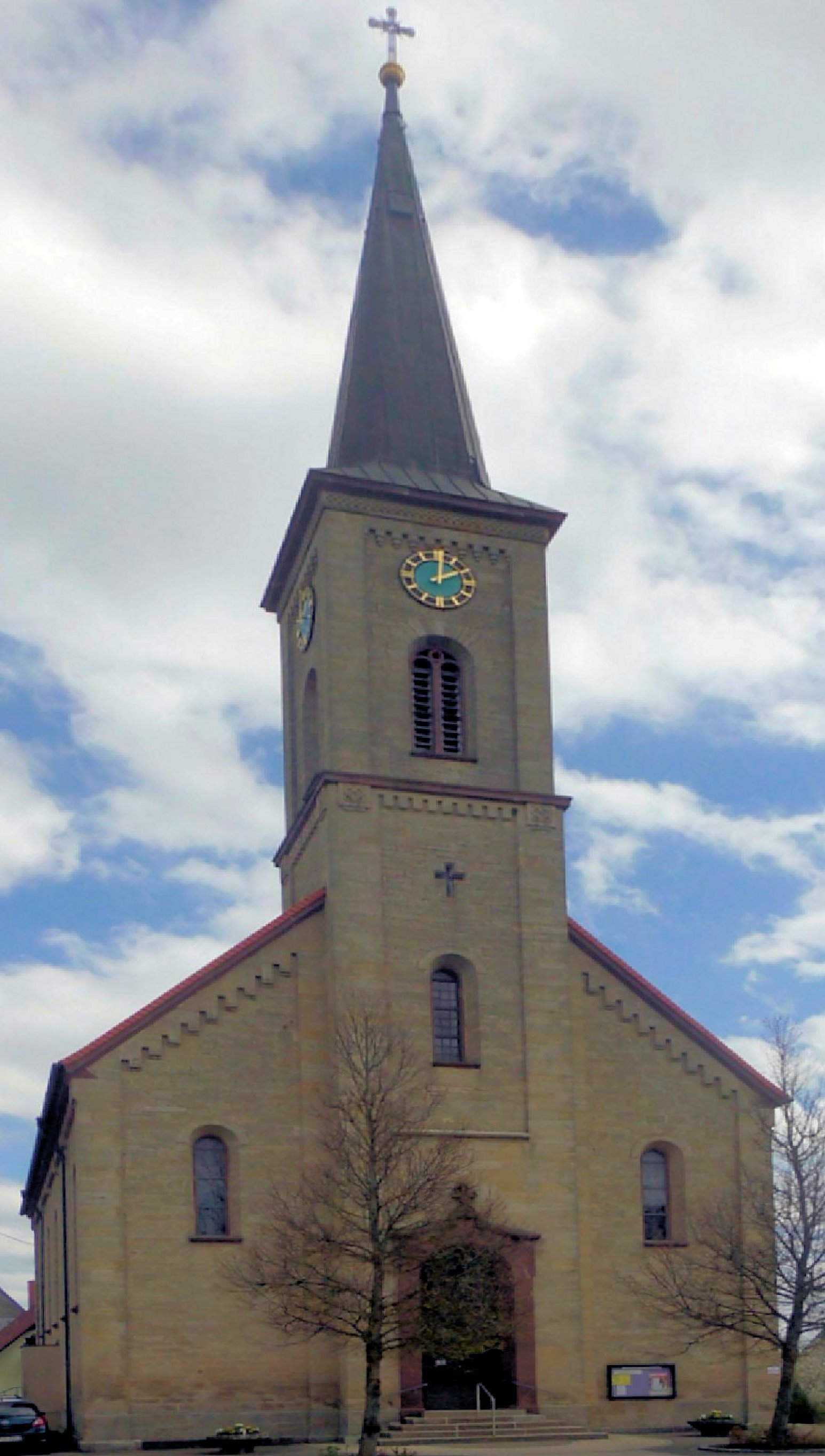 Kirche St. Mauritius in Döggingen, Stadt Bräunlingen